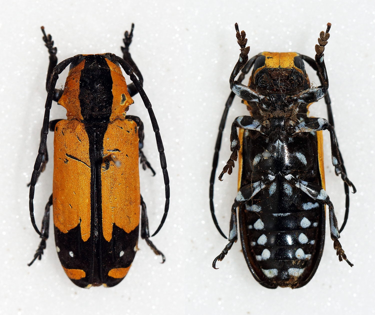 Aurivillius,1915 Sex: Female Data: 11-1971 - Lubumbashi - Katanga - Congo Size: 20mm